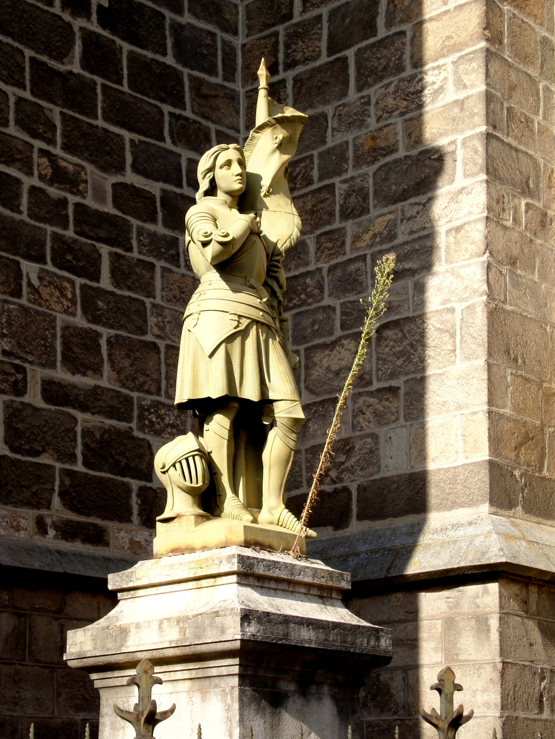 Statue en fonte de fer Jeanne d'Arc au sacre de Paul Aubert, à Montbrison (Loire). Une vergerette du Canada a poussé sur son socle.